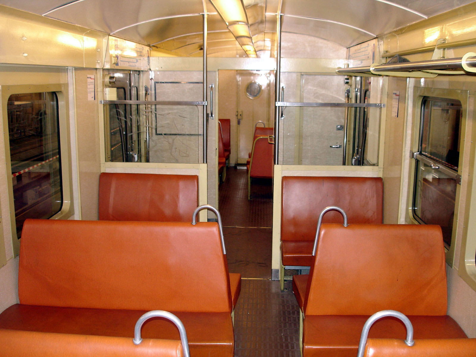 Intérieur d'un élément Z 6100 au technicentre Paris Nord-Joncherolles, Villetaneuse, Seine-Saint-Denis, France.